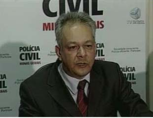 Vereador Delegado Edson Moreira falando sobre o Caso Eliza Samudio.